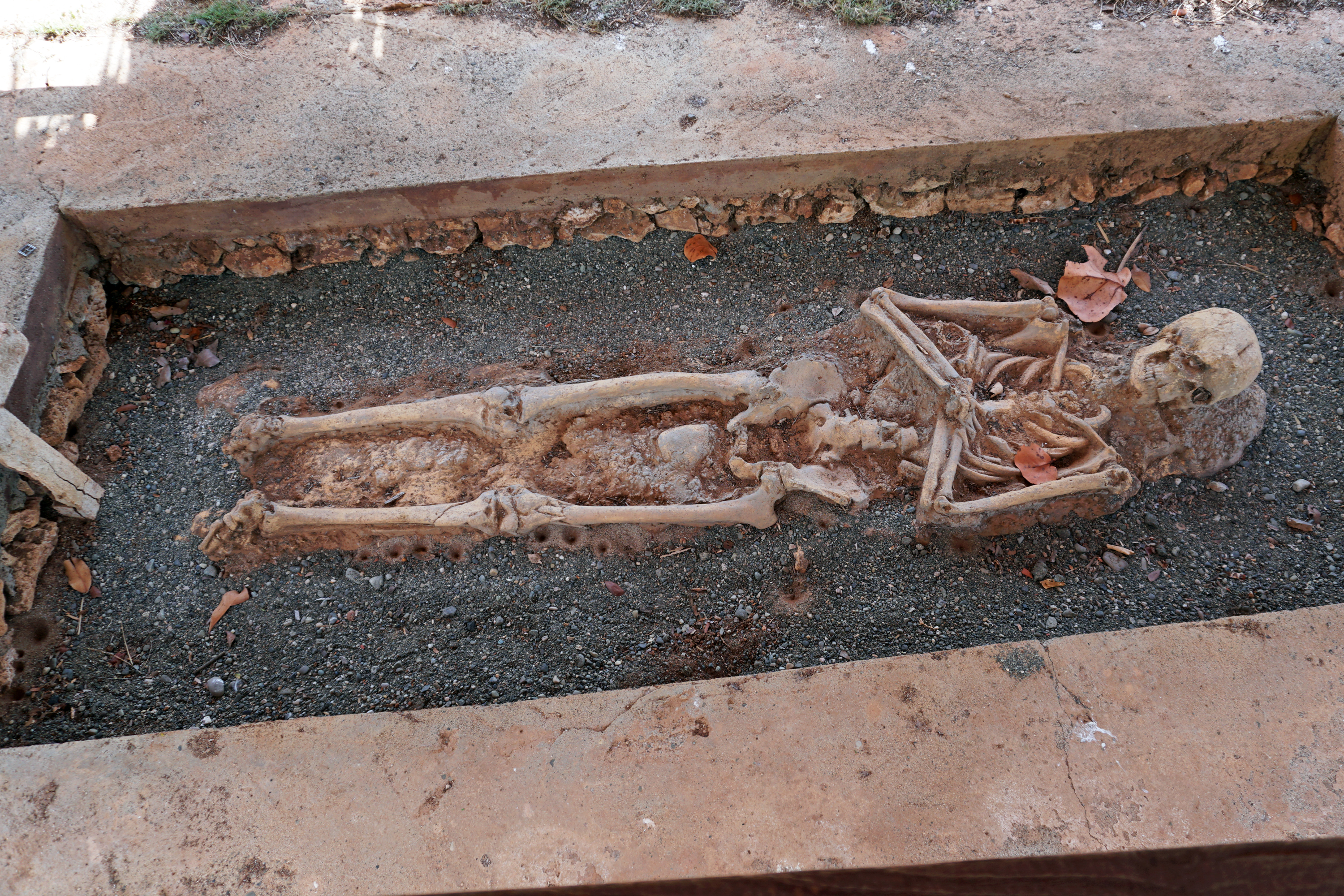 Esqueleto de un colono español enterrado en el cementerio de La Isabela, Parque Nacional Histórico y Arqueológico de La Isabela, Luperón, República Dominicana.